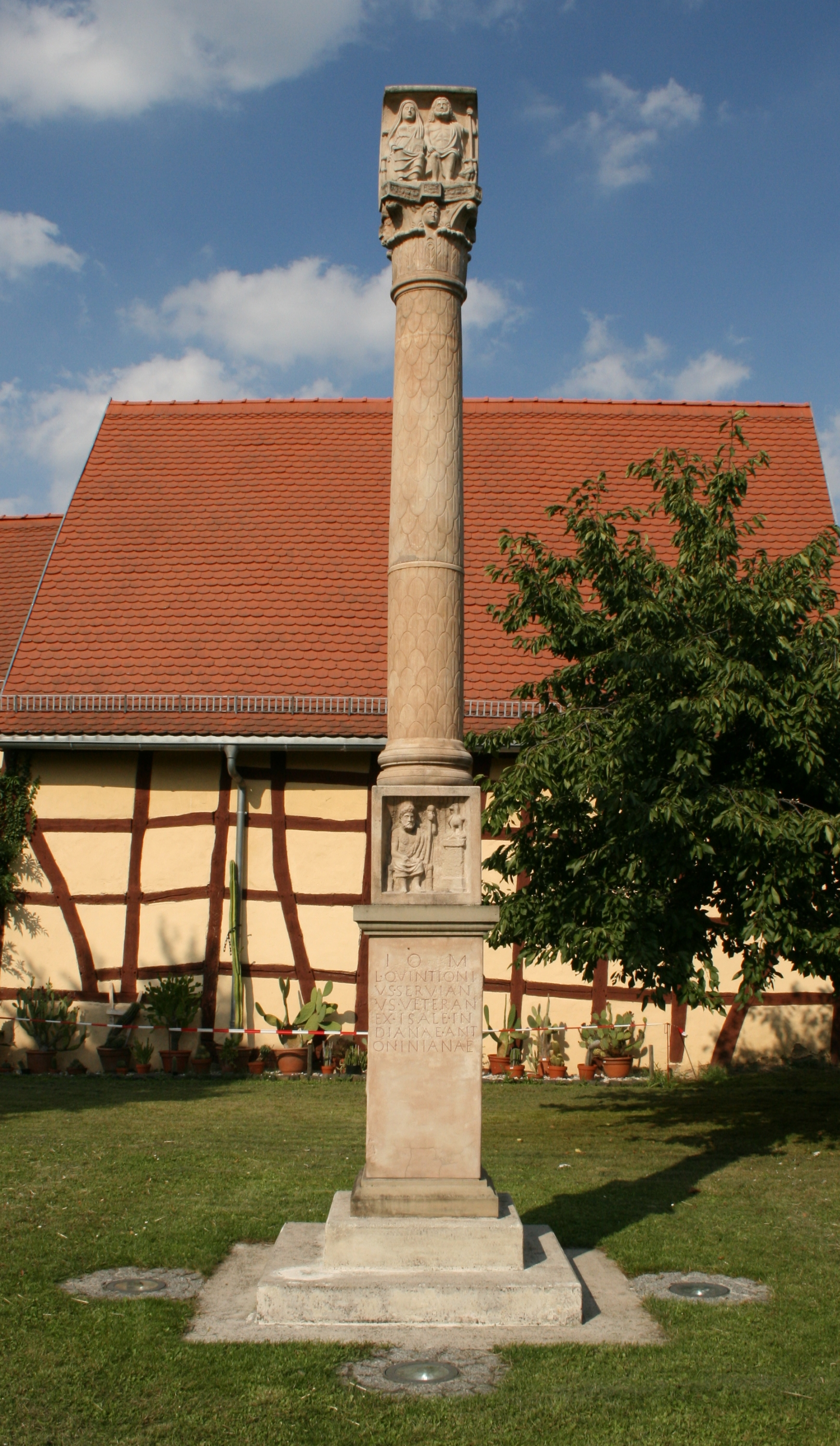 Echzell (Wetterau), Hessen, Rekonstruktion der Jupitersäule vor dem Museum. Inschrift: AE 2001, 1544